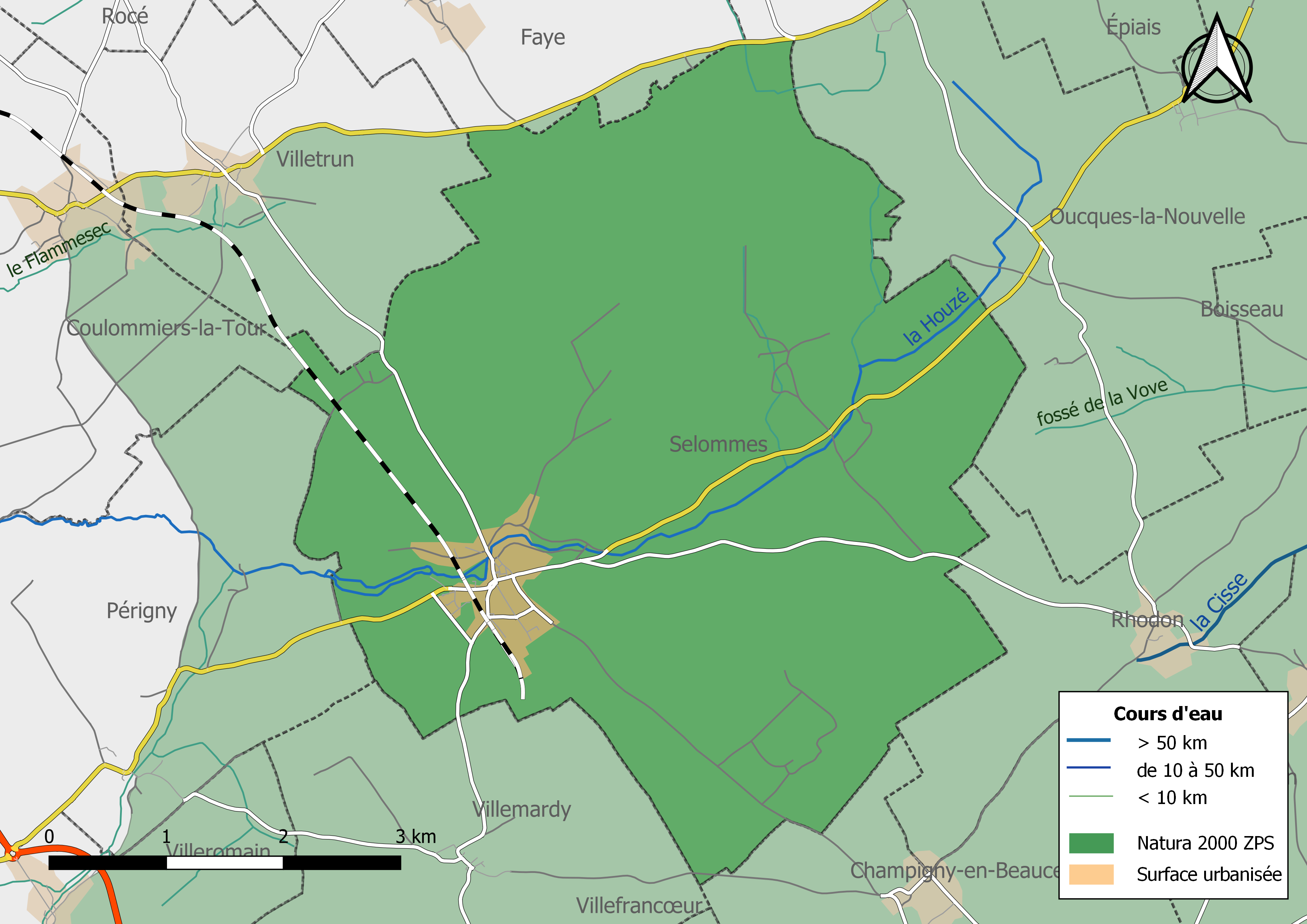 Carte du site Natura 2000 de type ZPS de la commune de Selommes (France).